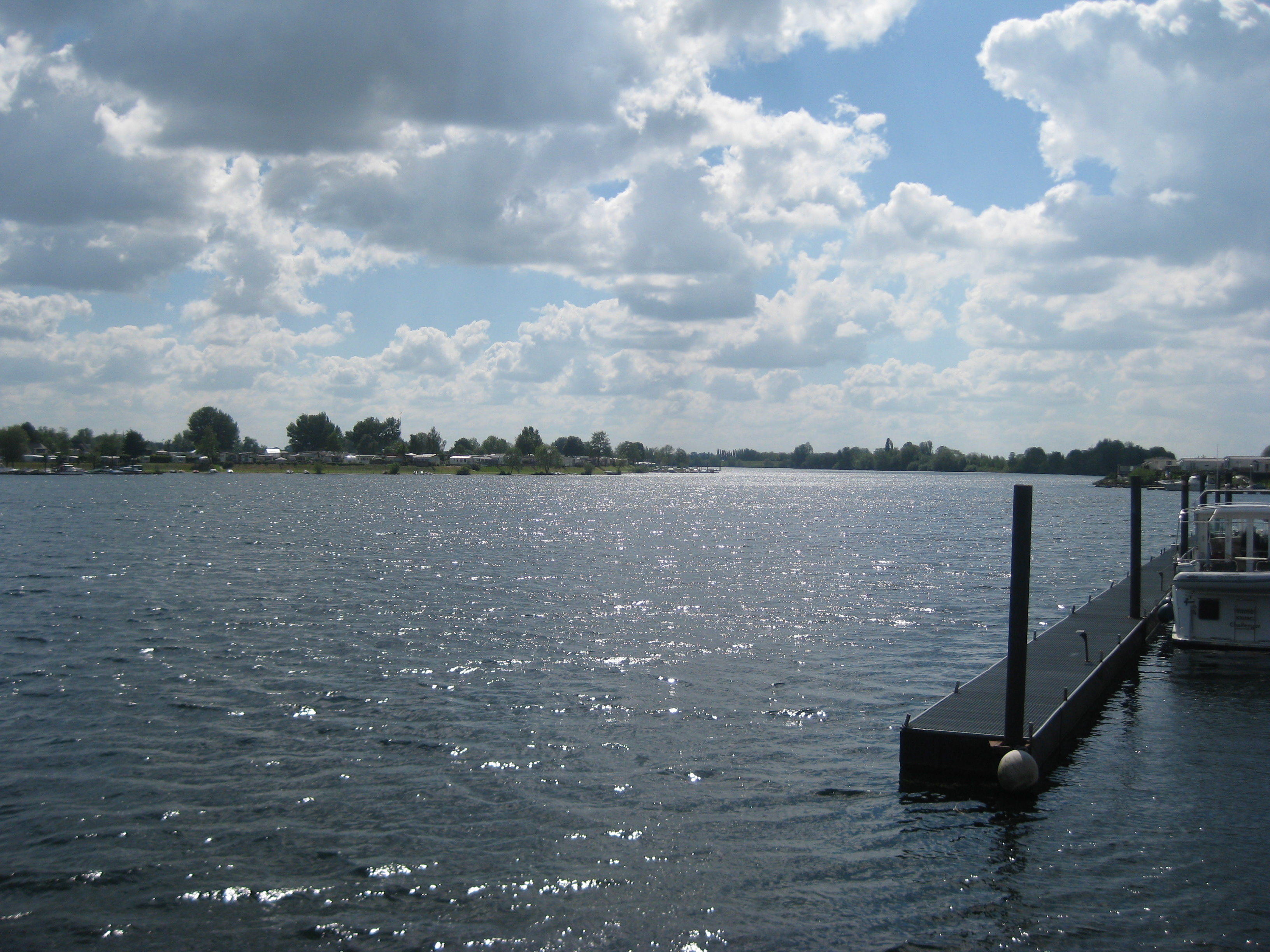 Recreatiegebied in Gelderland bij Maasbommel